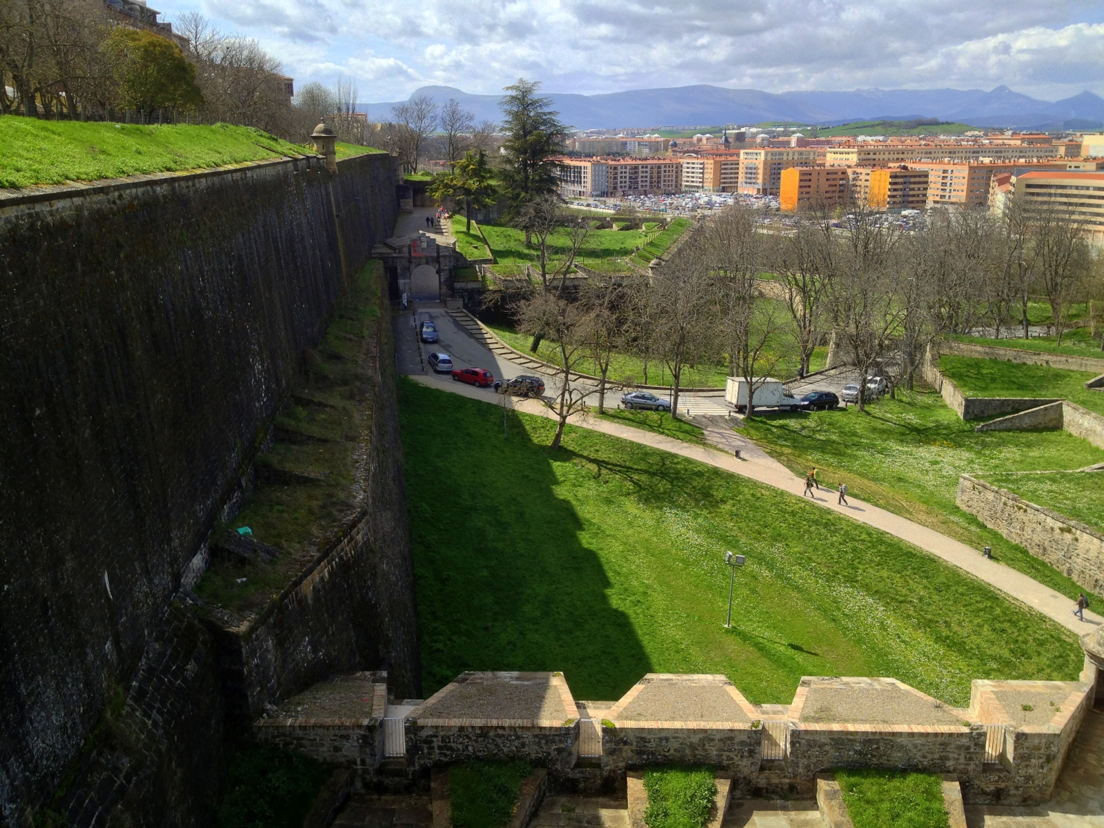 Pamplona